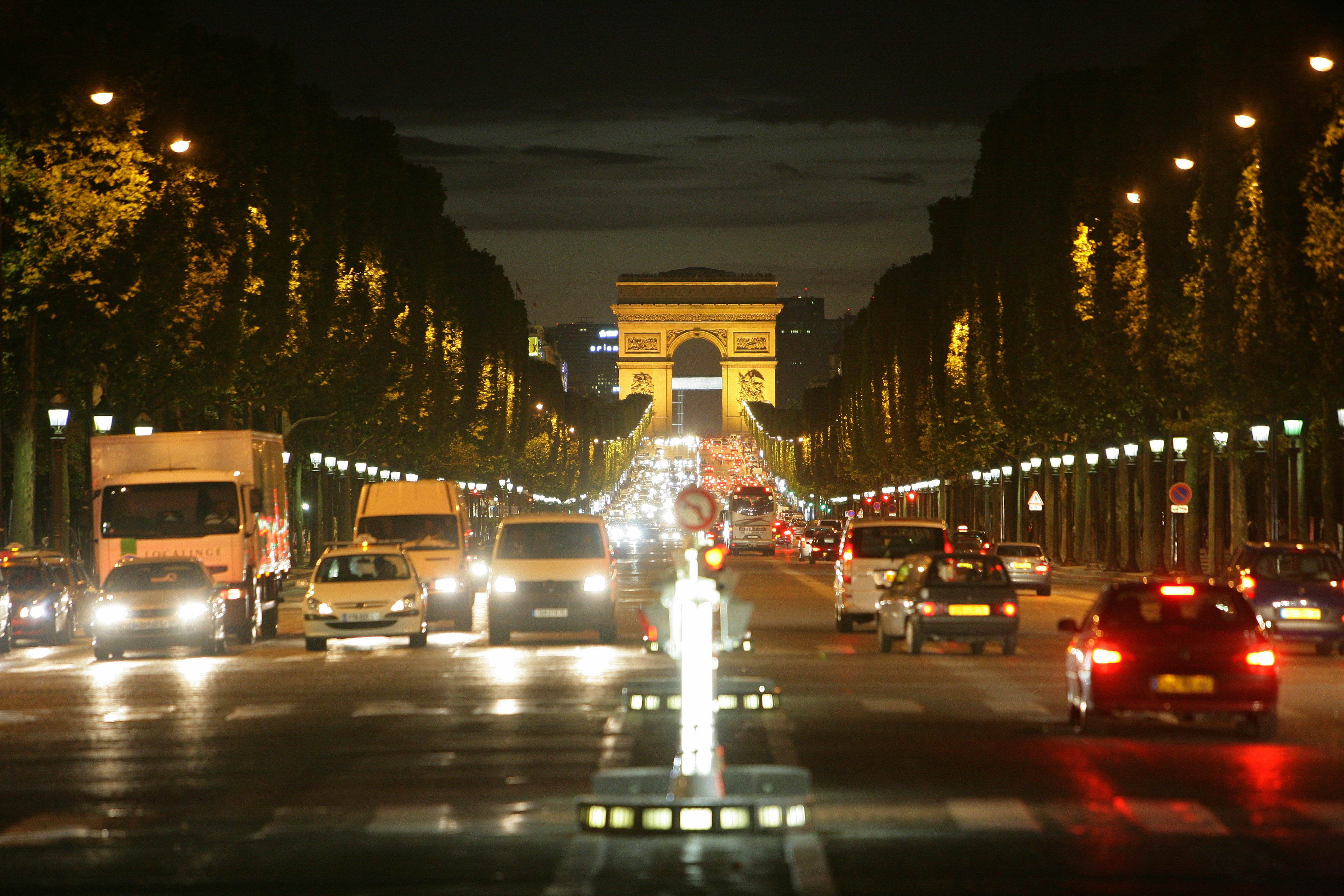 Avenue des Champs-Élysées